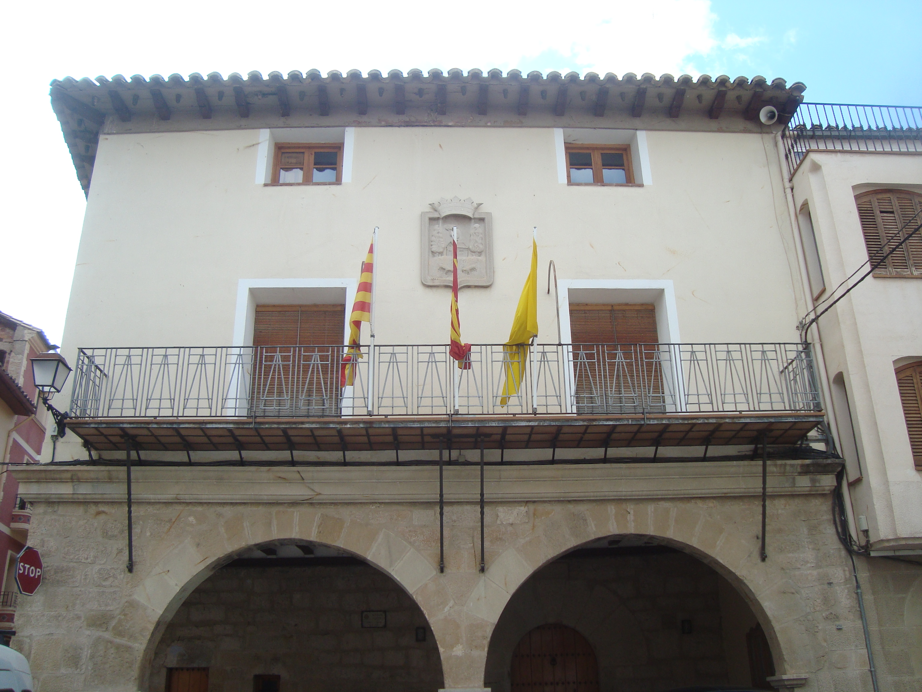 Ayuntamiento de Mas de las Matas (Teruel)